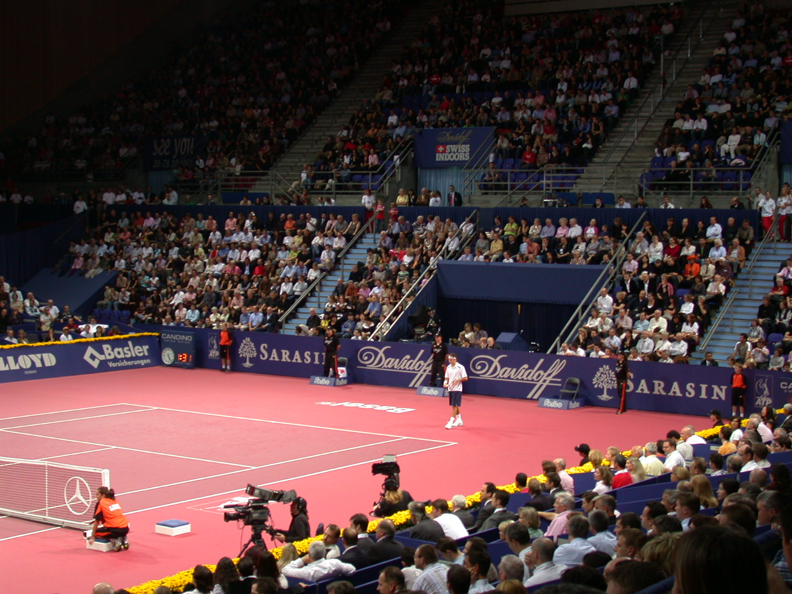 Roger Federer in Basel, Swiss Indoors 2006, semifinal against Paradorn Srichaphan